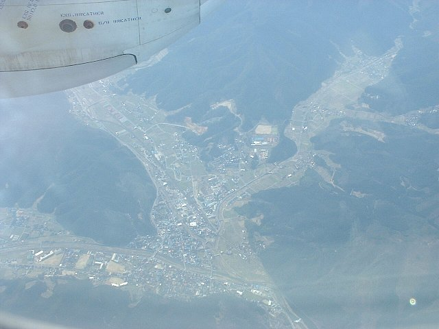 上空のja:YS-11から眺望した、鳥取県八頭郡ja:智頭町中心部